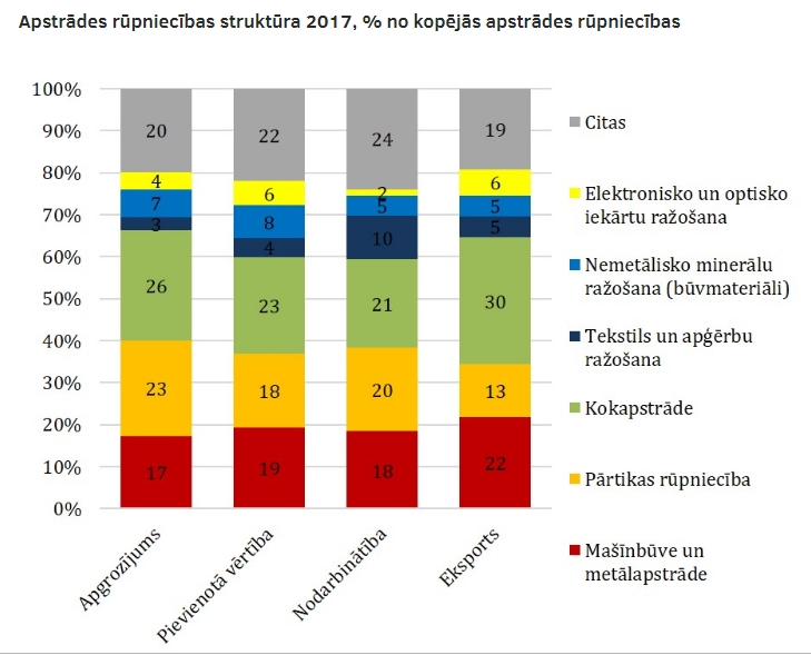 Apstrādes rūpniecības struktūra